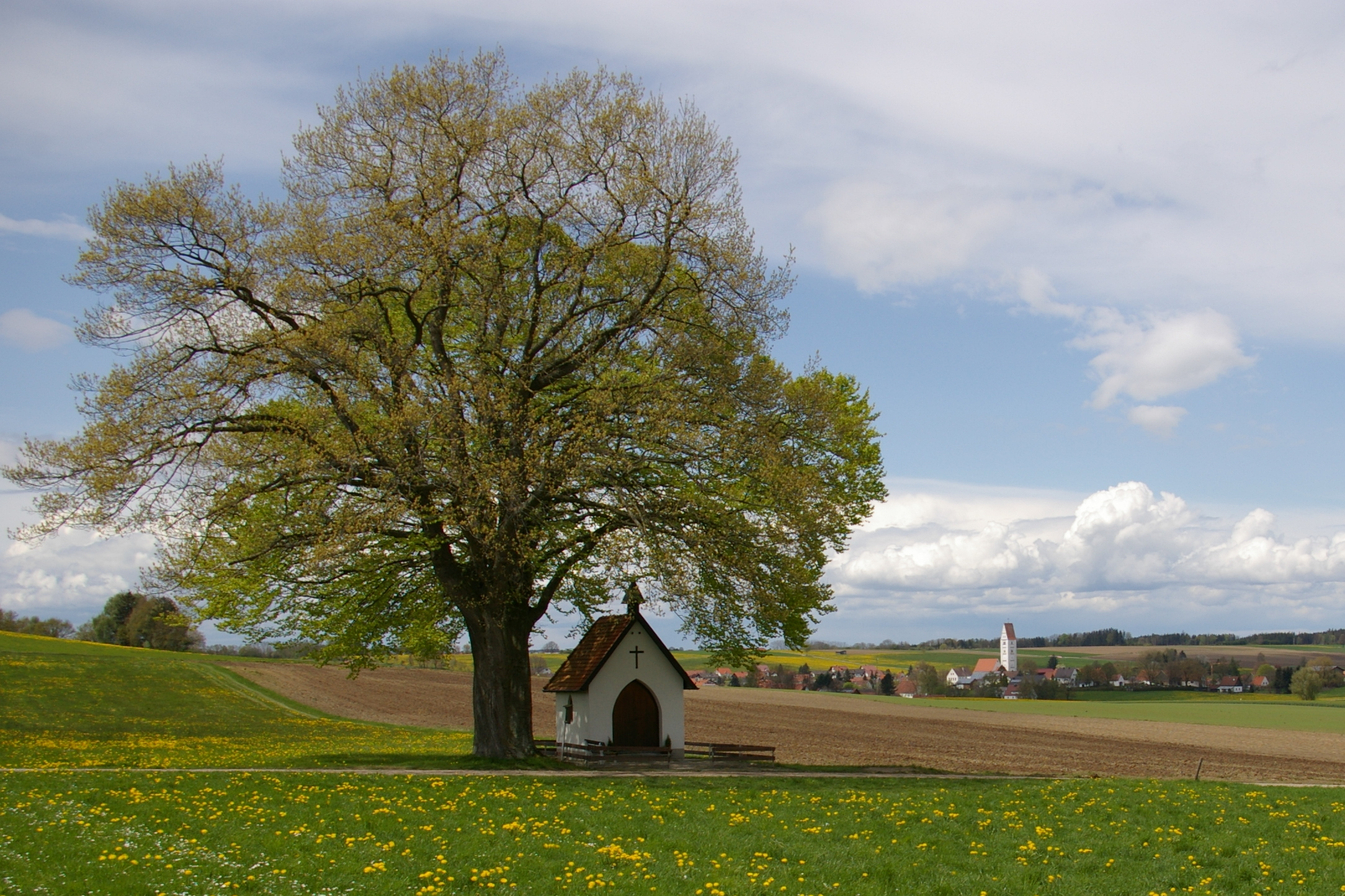 Buchkapelle im Osten von Eppishausen